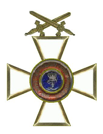 Officierskruis